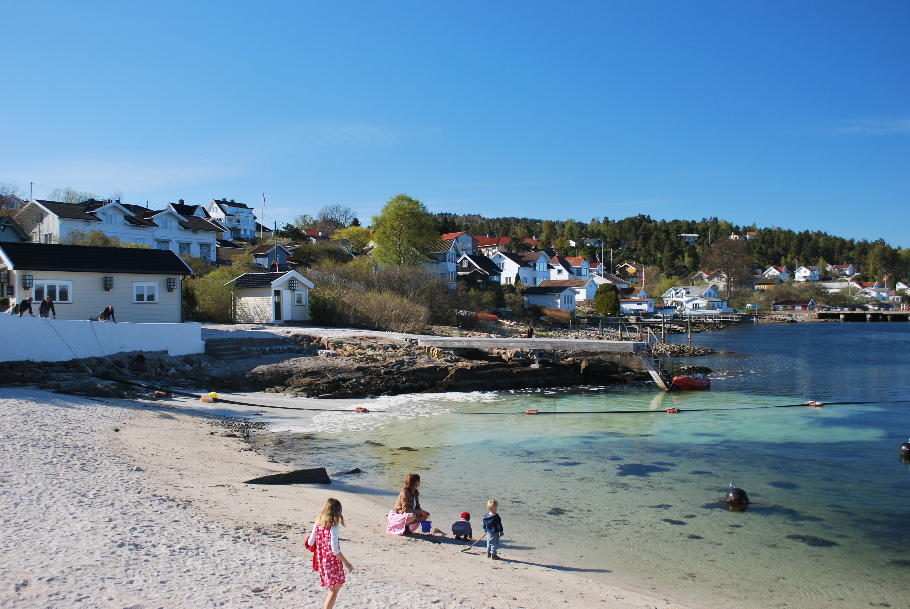 Bebyggelse på Filtvet sett fra stranden ved hotellbygningen, i dag restauranten Villamalla